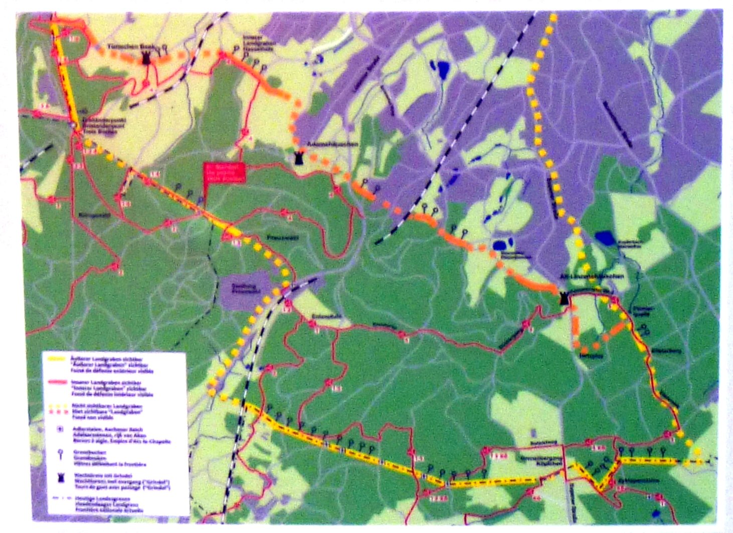 Kartenausschnitt einer Anzeigetafel im Aachener Wald betreffend des Verlaufes des inneren und äußeren Landgrabens